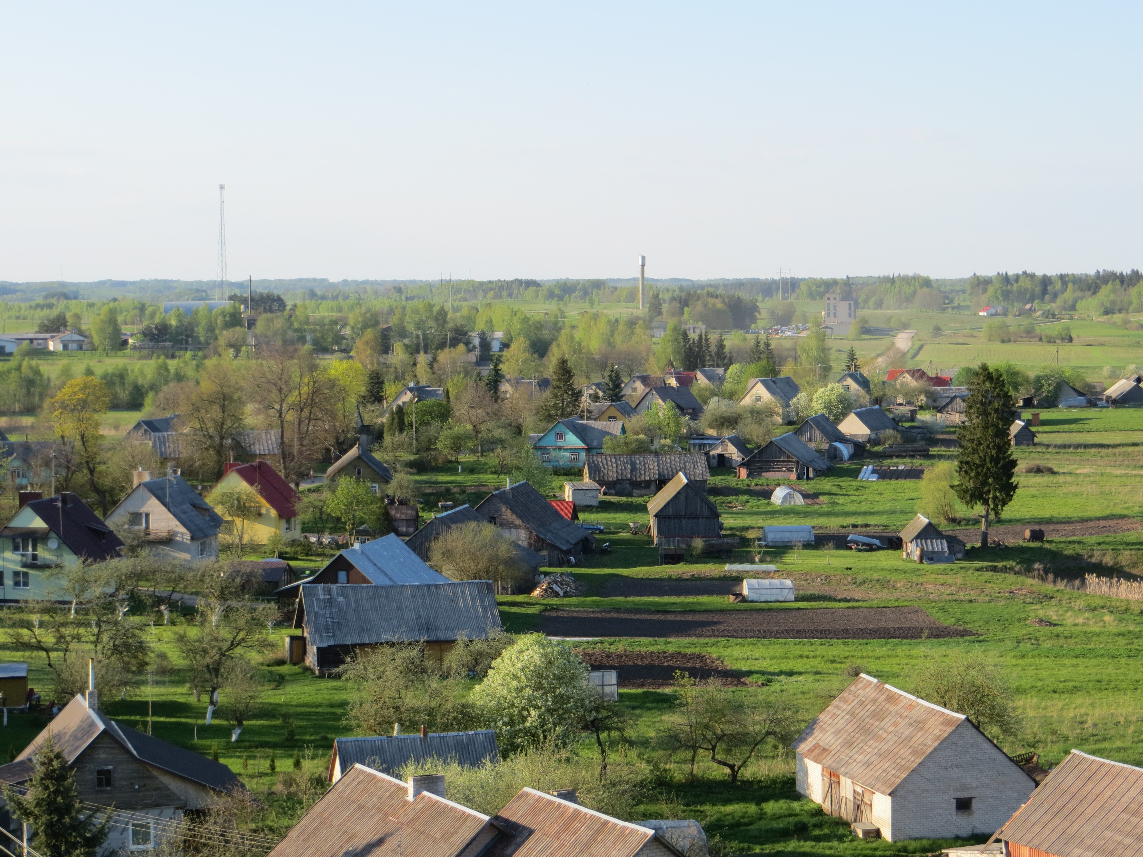 Suginčiai, Lithuania